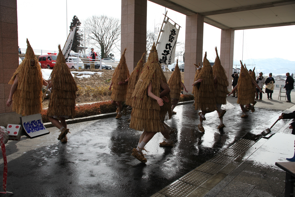 Strange Festival "Kasedori" 2009 on Flickr